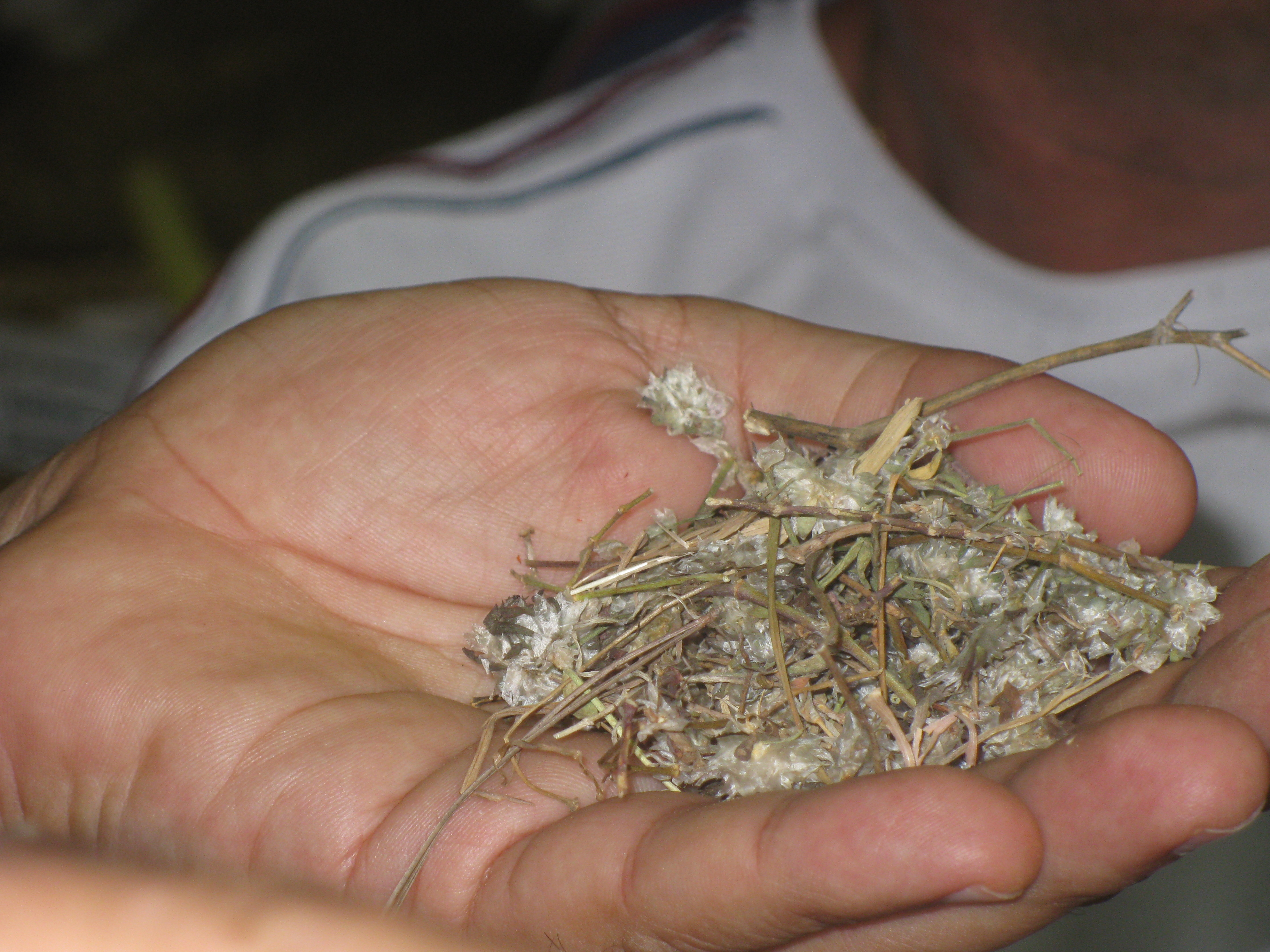 Old City of Jerusalem - the Market שווקי העיר העתיקה של ירושלים